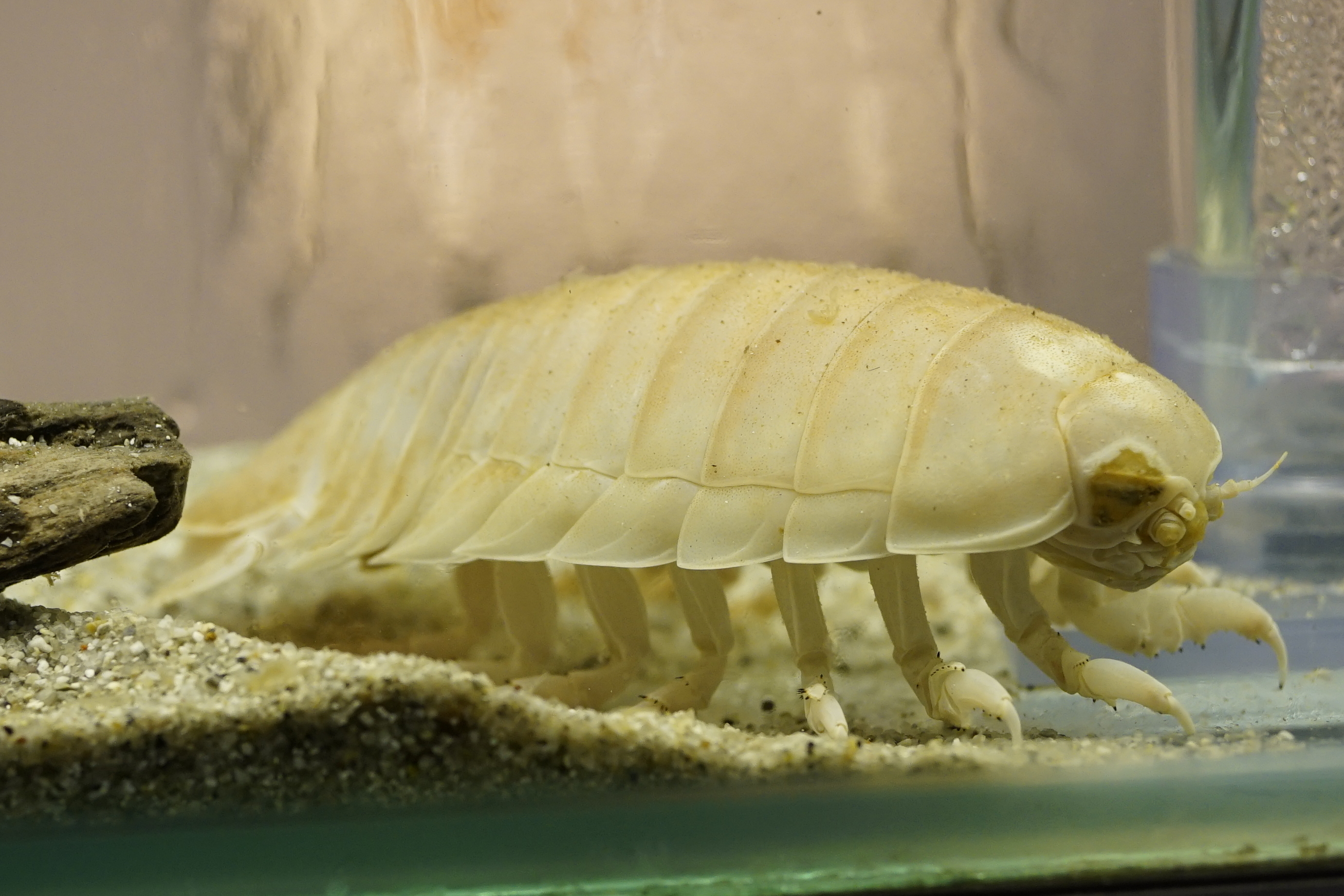 ニューカレドニアオオグソクムシ en: Domain: Eukaryota • Regnum: Animalia • Subregnum: Eumetazoa • Cladus: Bilateria • Superphylum: Protostomia • Cladus: Ecdysozoa • Phylum: Arthropoda • Subphylum: Crustacea • Classis: Malacostraca • Subclassis: Eumalacostraca • Superordo: Peracarida • Ordo: Isopoda • Subordo: Cymothoida • Familia: Cirolanidae • Genus: Bathynomus • Species: Bathynomus richeri Wikispecies has an entry on: Bathynomus richeri. Species Bathynomus richeri Lowry & Dempsey, 2006 動物界 節足動物門 甲殻綱 ワラジムシ目(等脚目) スナホリムシ科 オオグソクムシ属 Location: 鳥羽水族館 Other photos: EOL link: Bathynomus richeri uBio search link: Bathynomus richeri